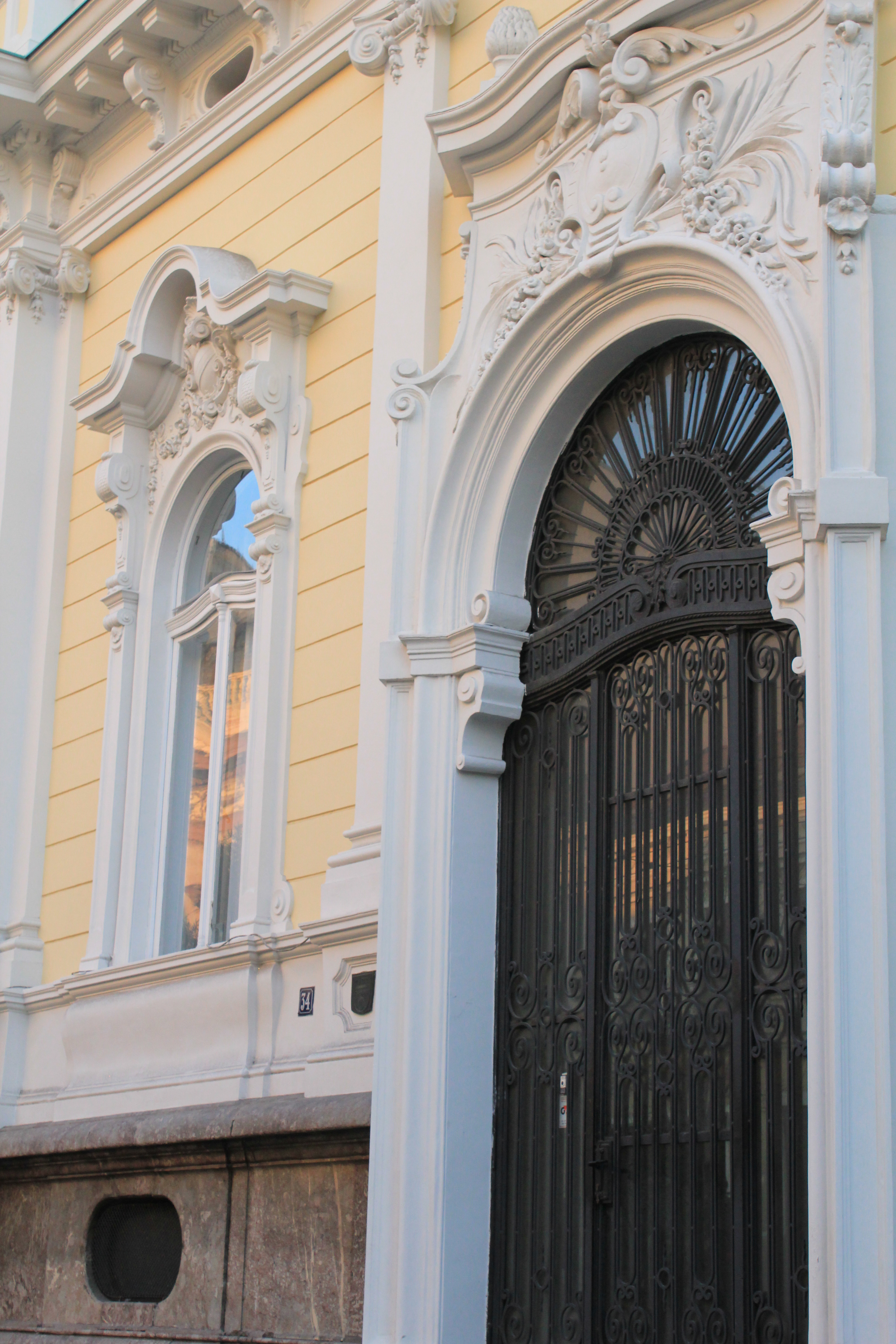 Krsmanovićeva kuća na Terazijama